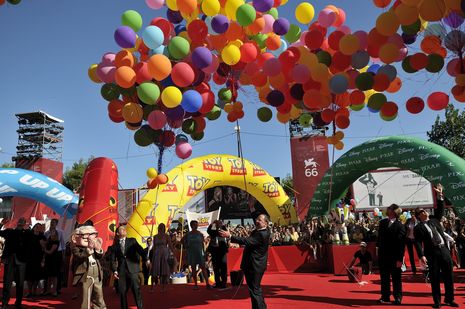 66ème Festival du Cinéma de Venise (Mostra), 5ème jour (06/09/2009) George Lucas et les réalisateurs de Pixar reçoivent un Lion d'Or pour l'ensemble de leur carrière : John Lasseter (Toy Story, 1001 Pattes, Cars...), Brad Bird (Les Indestructibles, Ratatouille), Pete Docter (Monstres et Cie, Là-haut), Andrew Stanton (Le Monde de Nemo, WALL•E) et Lee Unkrich (Toy Story 2, Monstres et Cie, Le Monde de Nemo)